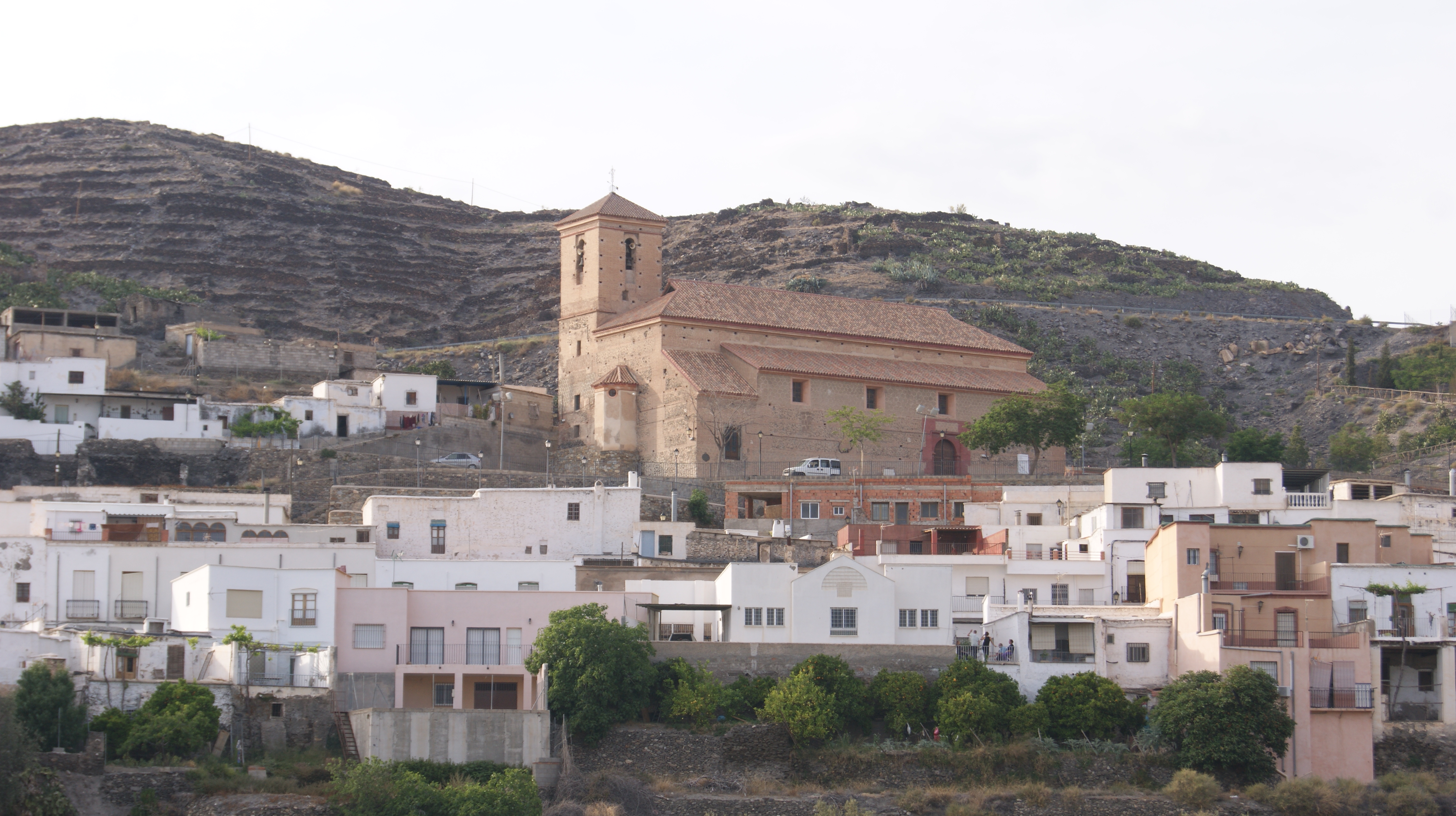 Iglesia de Gérgal